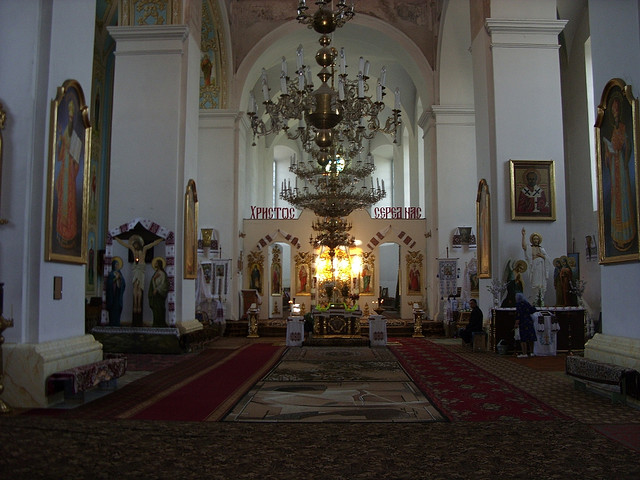 Wnętrze cerkwi św. Mikołaja w Dubnie, dawnego kościoła franciszkanów, obecnie cerkwi Ukraińskiego Kościoła Prawosławnego Patriarchatu Kijowskiego.